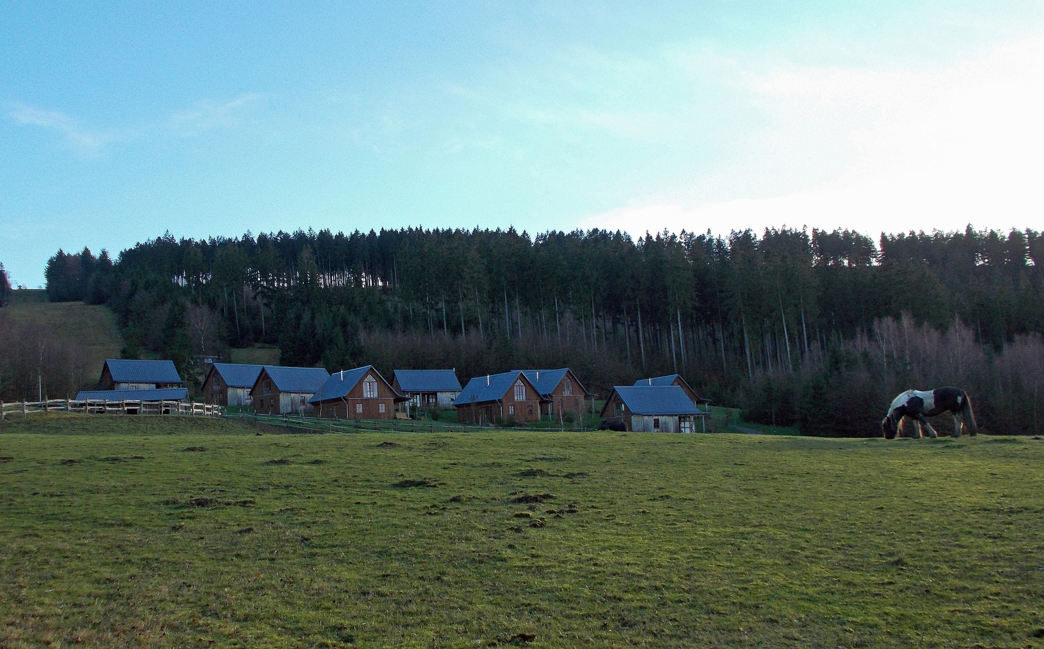 Schmallenberg, Bergdorf LiebesGrün